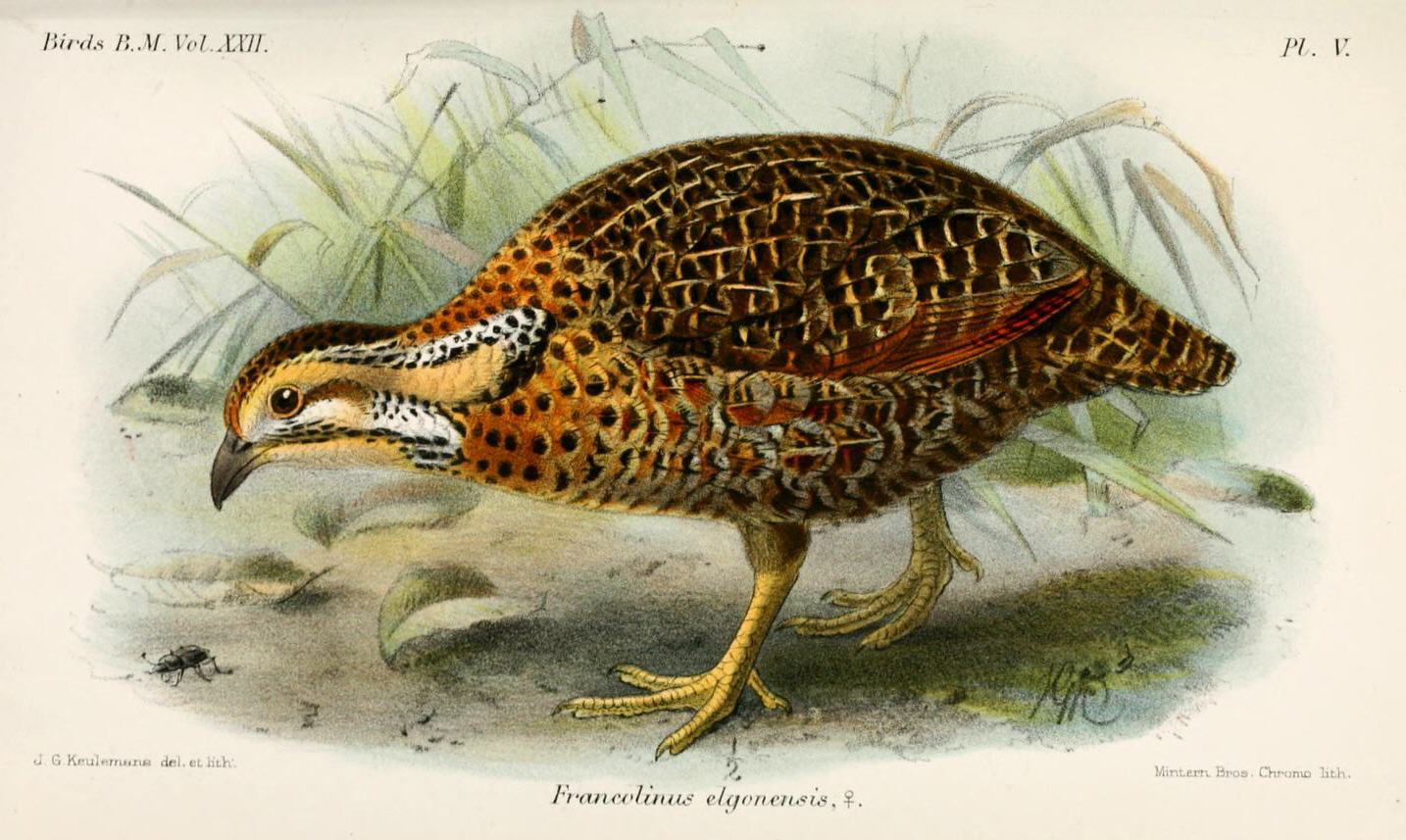 Francolinus elgonensis (Elgon's Francolin) = Scleroptila psilolaema elgonensis